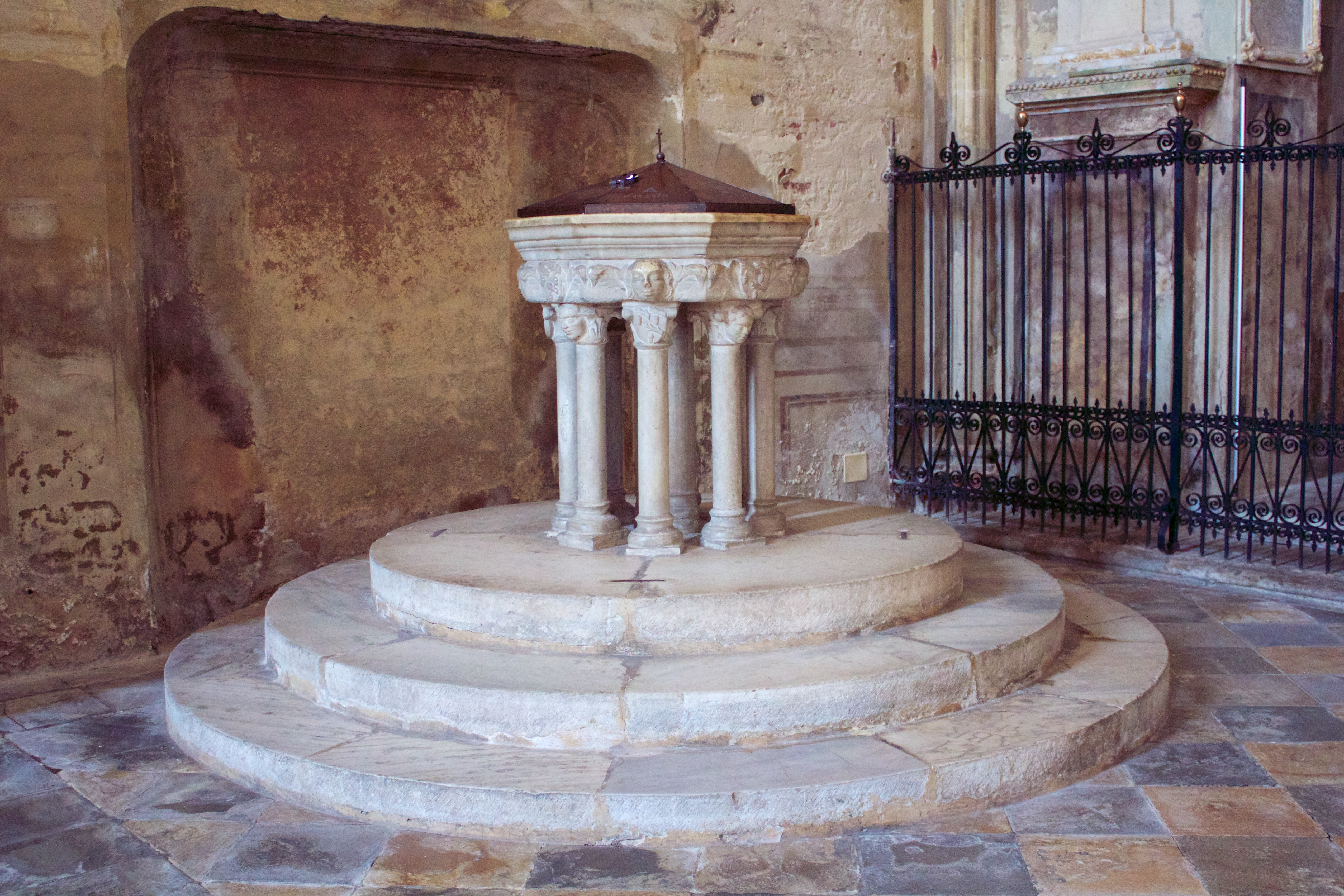 Fonte battesimale nel Duomo di Asti